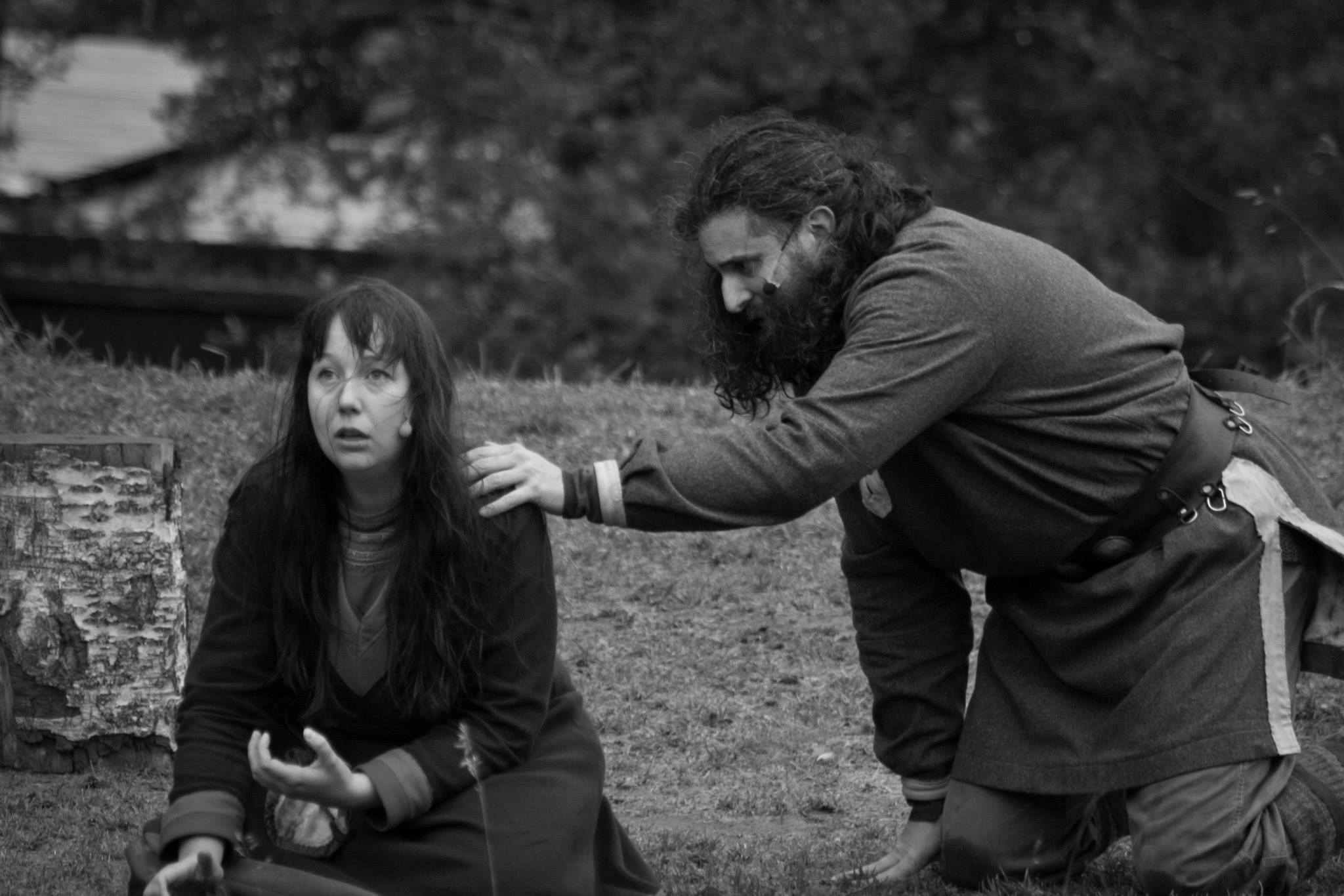 Vaino (Mikaela Pålsson) och Arnljot (Emil Grudemo El Hayek). Arnljotspelen 2015. Regi: Stefan Moberg.